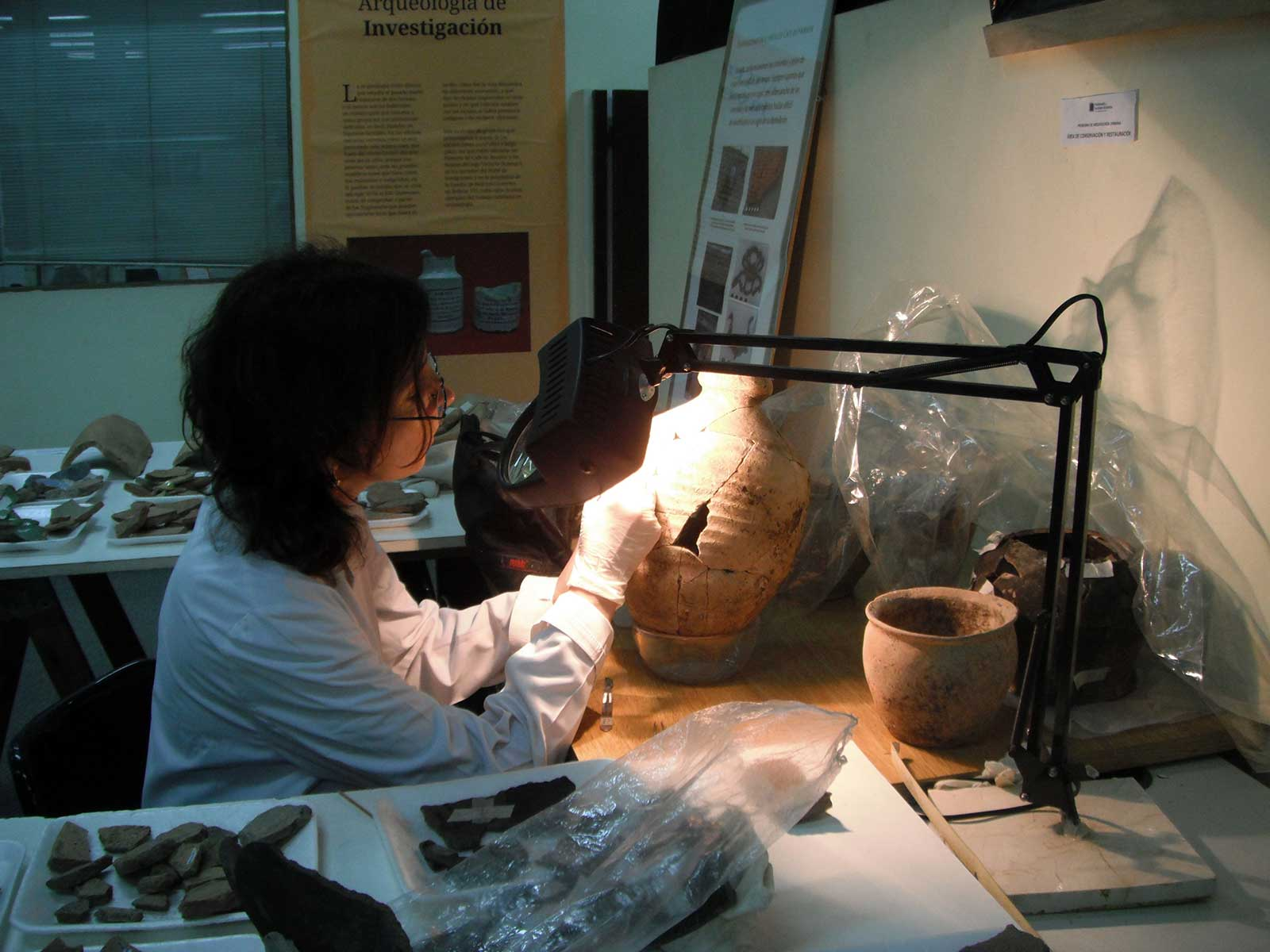 Tareas de Conservación y Restauración de material arqueológico.